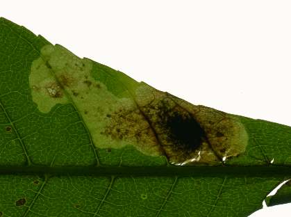 Mine von Cameraria ohridella